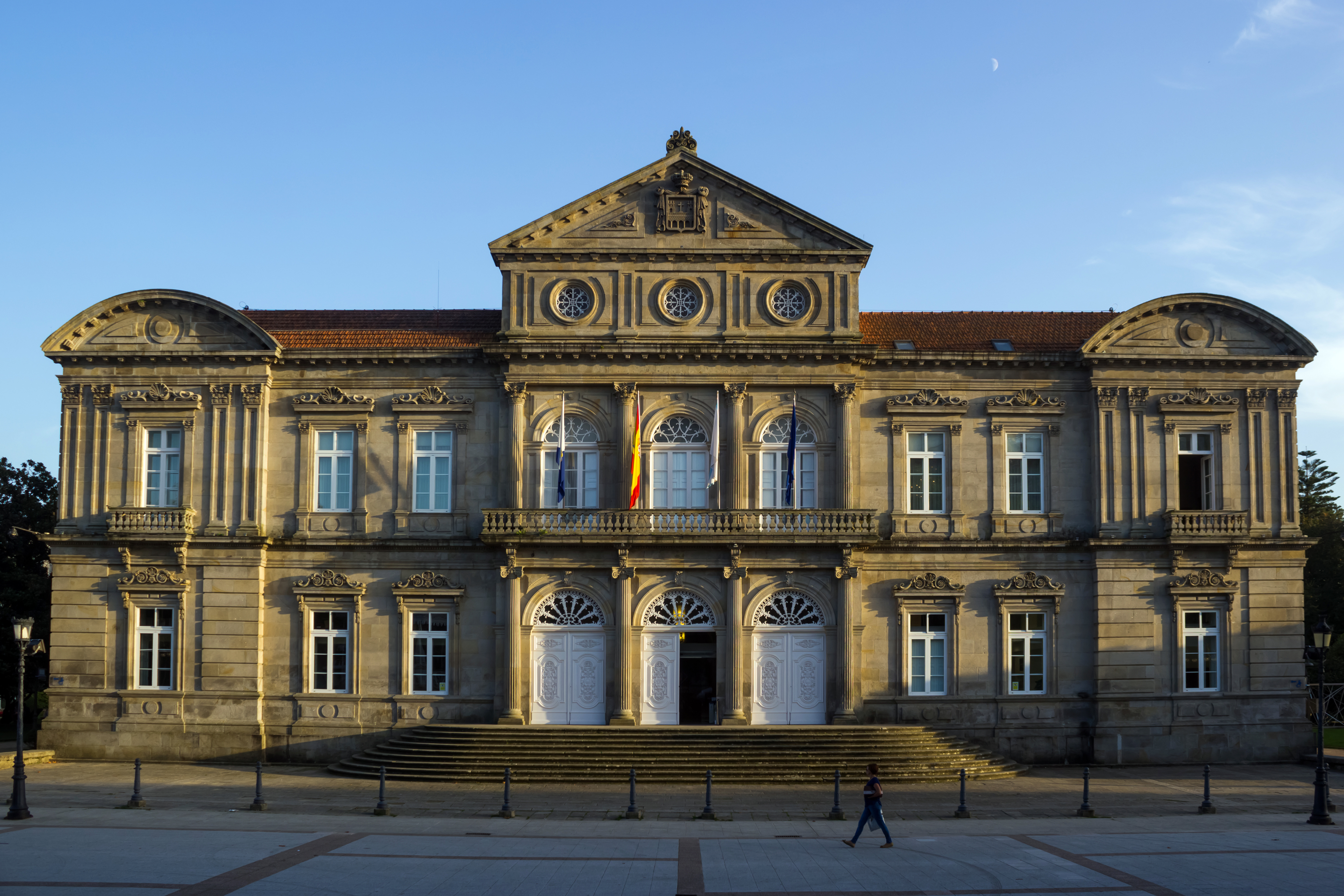 Pazo da Deputación de Pontevedra.